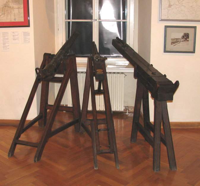 Topovi za oglašavanje podneva (Grički topovi) u Muzeju grada Zagreba. top za oglašavanje podneva, Zagreb, 1876. top za oglašavanje podneva, Zagreb, kraj XIX. st. - satnik Gjuro Čačković i stolar R. Eisenhuth (prvi top koji se oglasio s kule Lotrščak 1927. g.) top za oglašavanje podneva, Zagreb (?), 1928. - top je izrađen od prerađenog poljskog topa M1912. Top je inauguriran 15. travnja 1928.